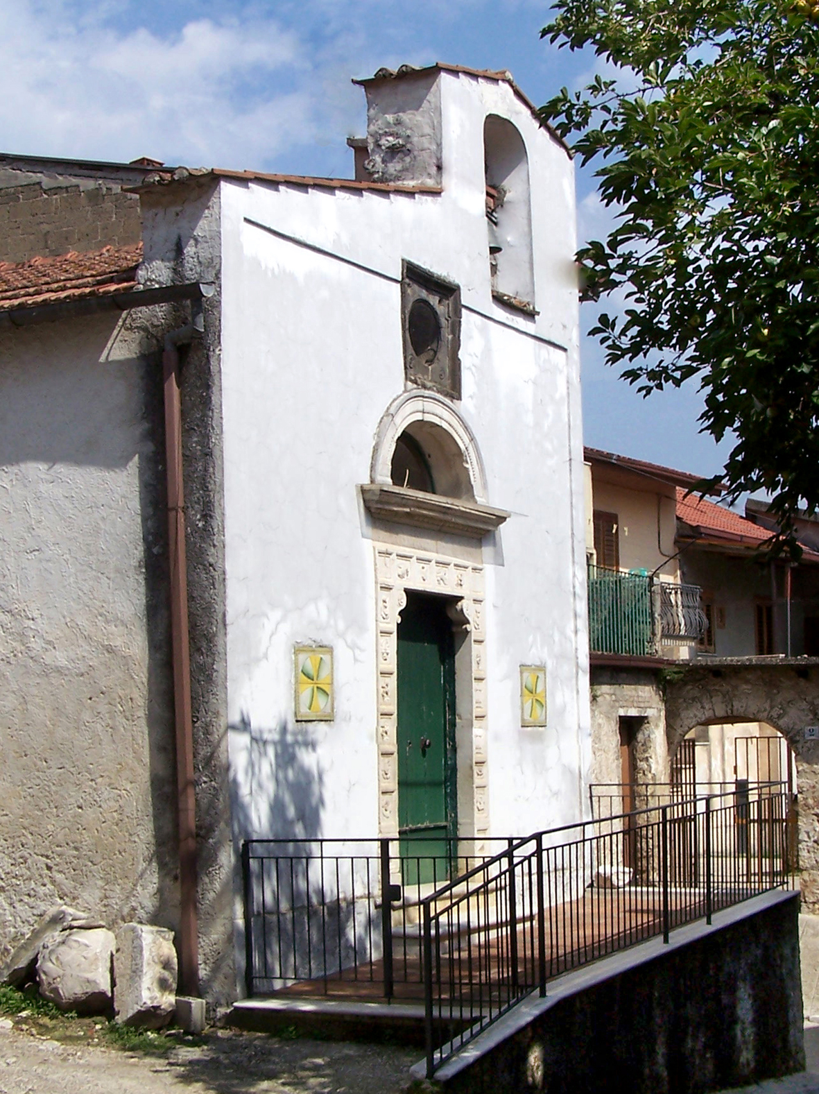 Chiesa di Santa Maria della Natività. Alvignano. Autore Alvimas.